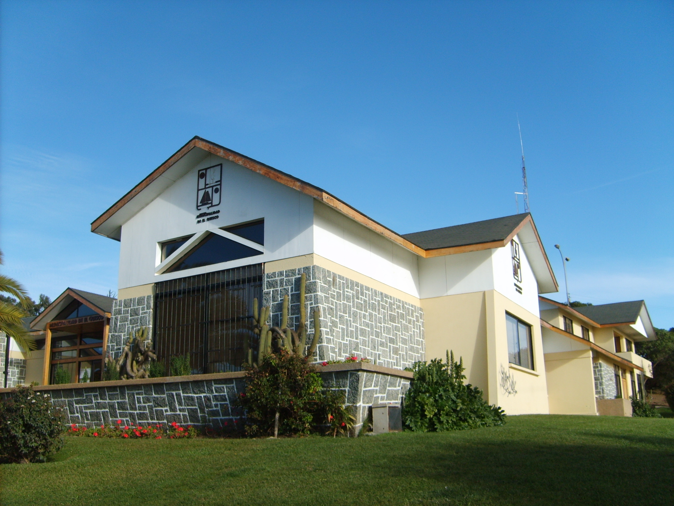 Municipalidad de El Quisco, ubicada en Av. Francia #011. El Quisco, Valparaíso, Chile.